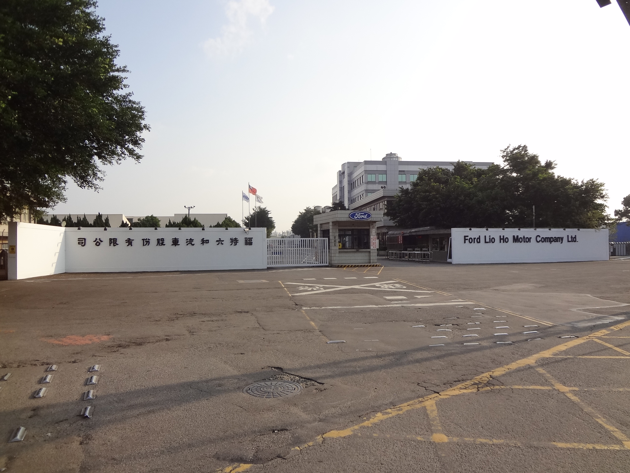 福特六和汽車總部，位於臺灣桃園縣中壢市中華路一段705號。